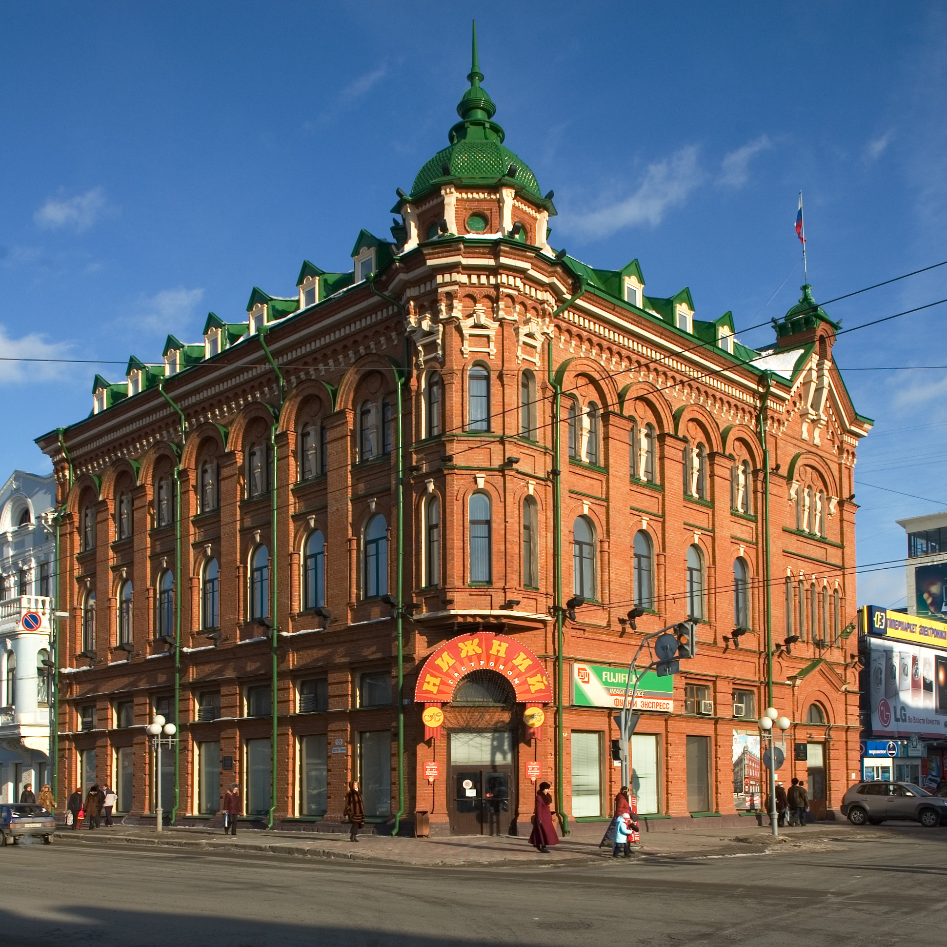 Нижний гастроном. Дума города Томска. пр. Ленина, 105. пер. Нахановича, 8.